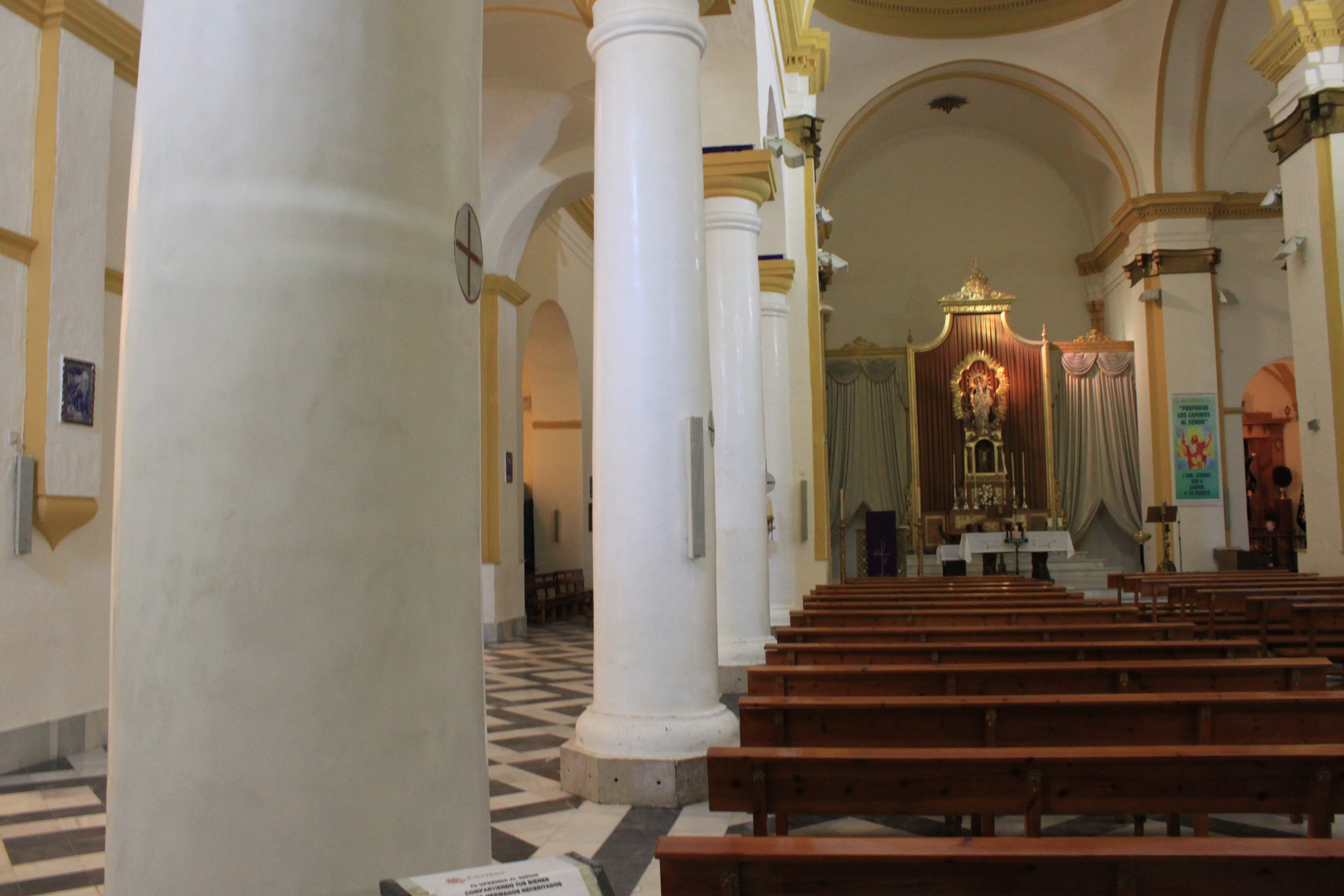 Nave central de la Iglesia de Nuestra Señora de la Palma. Algeciras, Andalucía, España.